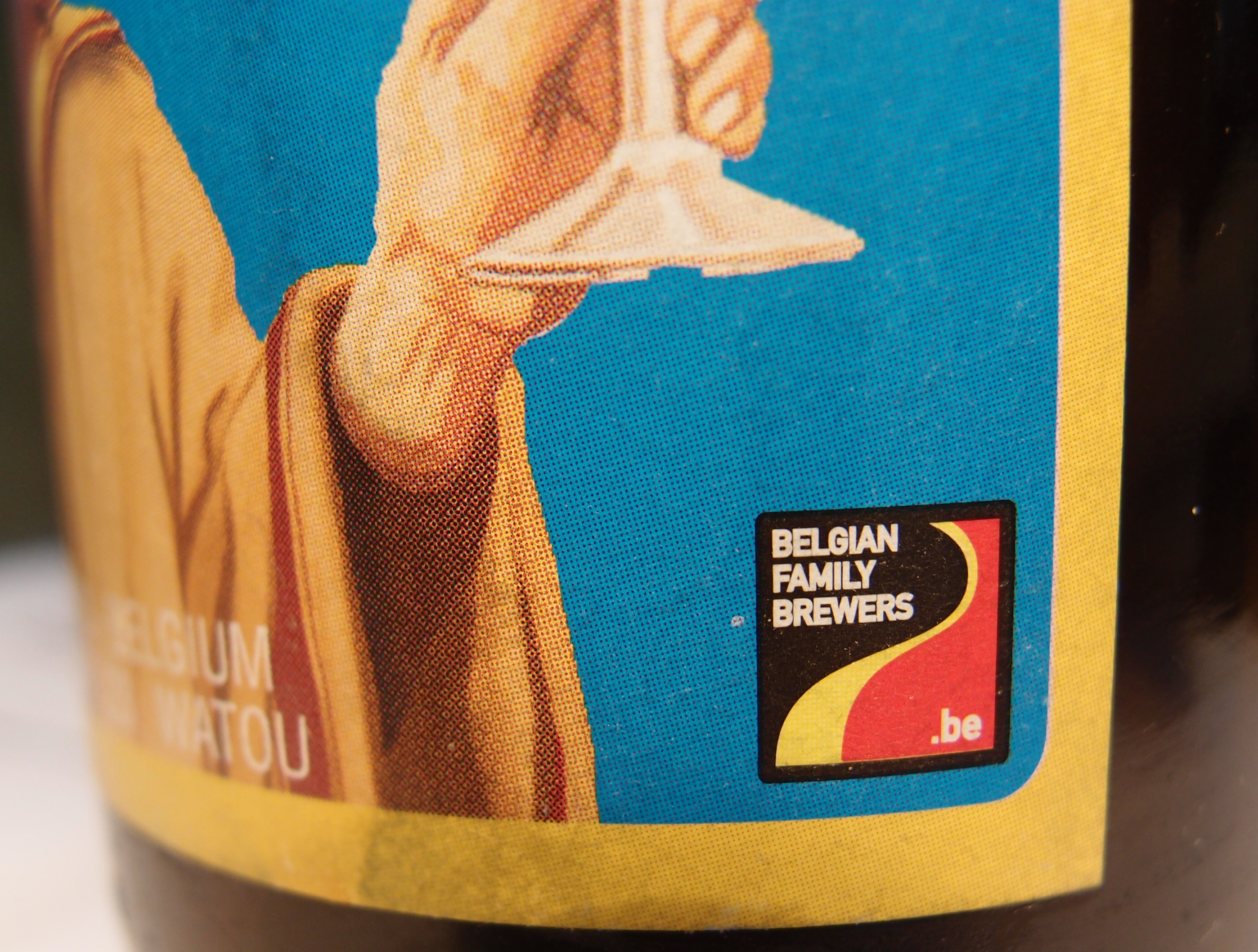 St. Bernardus Bierflasche/-etikett (mit Logo des belg. Brauverbandes "BELGIAN FAMILY BREWERS") Datum: 08.12.2013 Urheber: M. Pfeiffer alias Benutzer:Gordito1869 Quelle: Privates Fotoarchiv des Urhebers